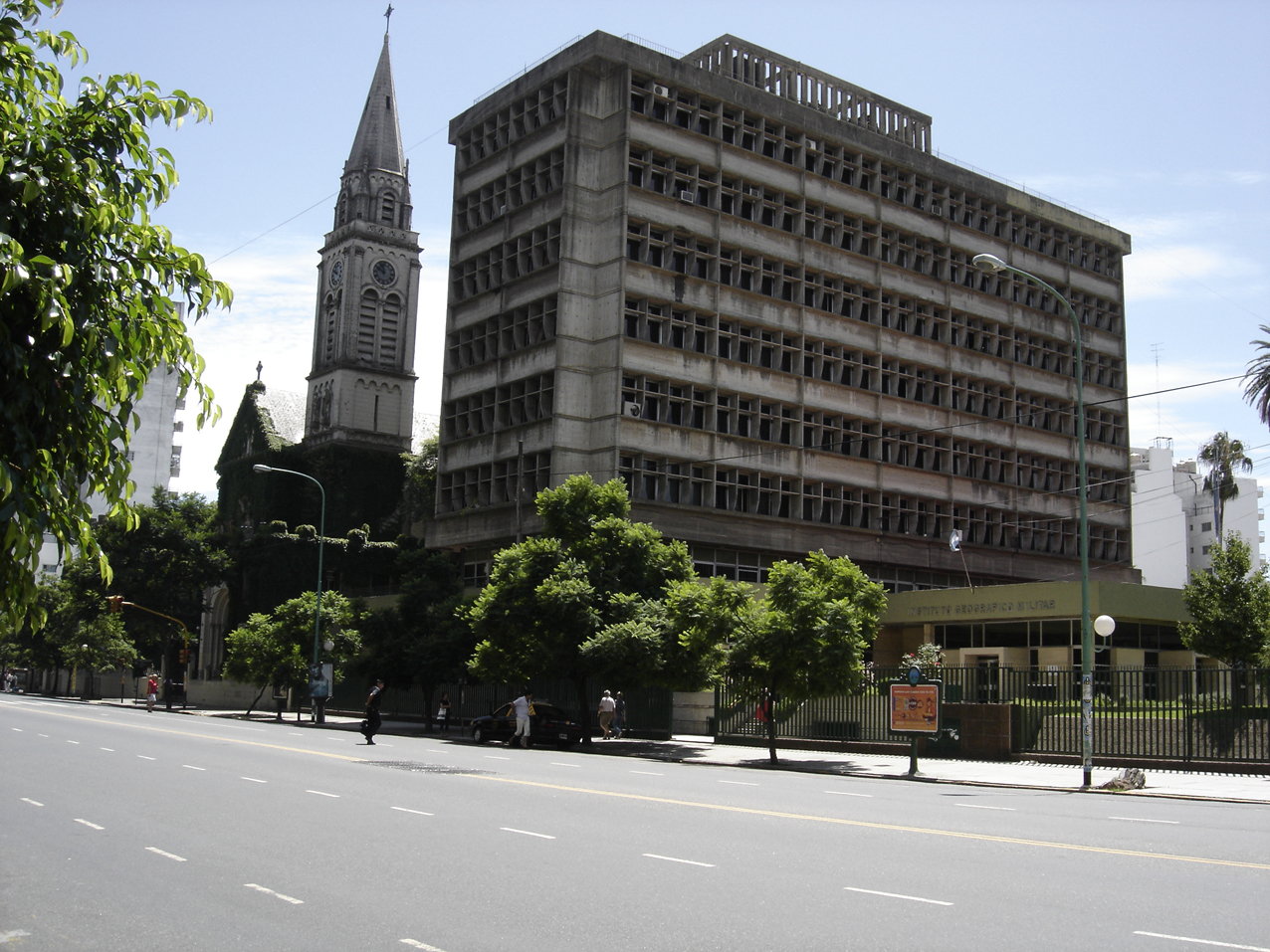 INSTITUTO GEOGRÁFICO NACIONAL (Avenida Cabildo 381) Ciudad Autónoma de Buenos Aires